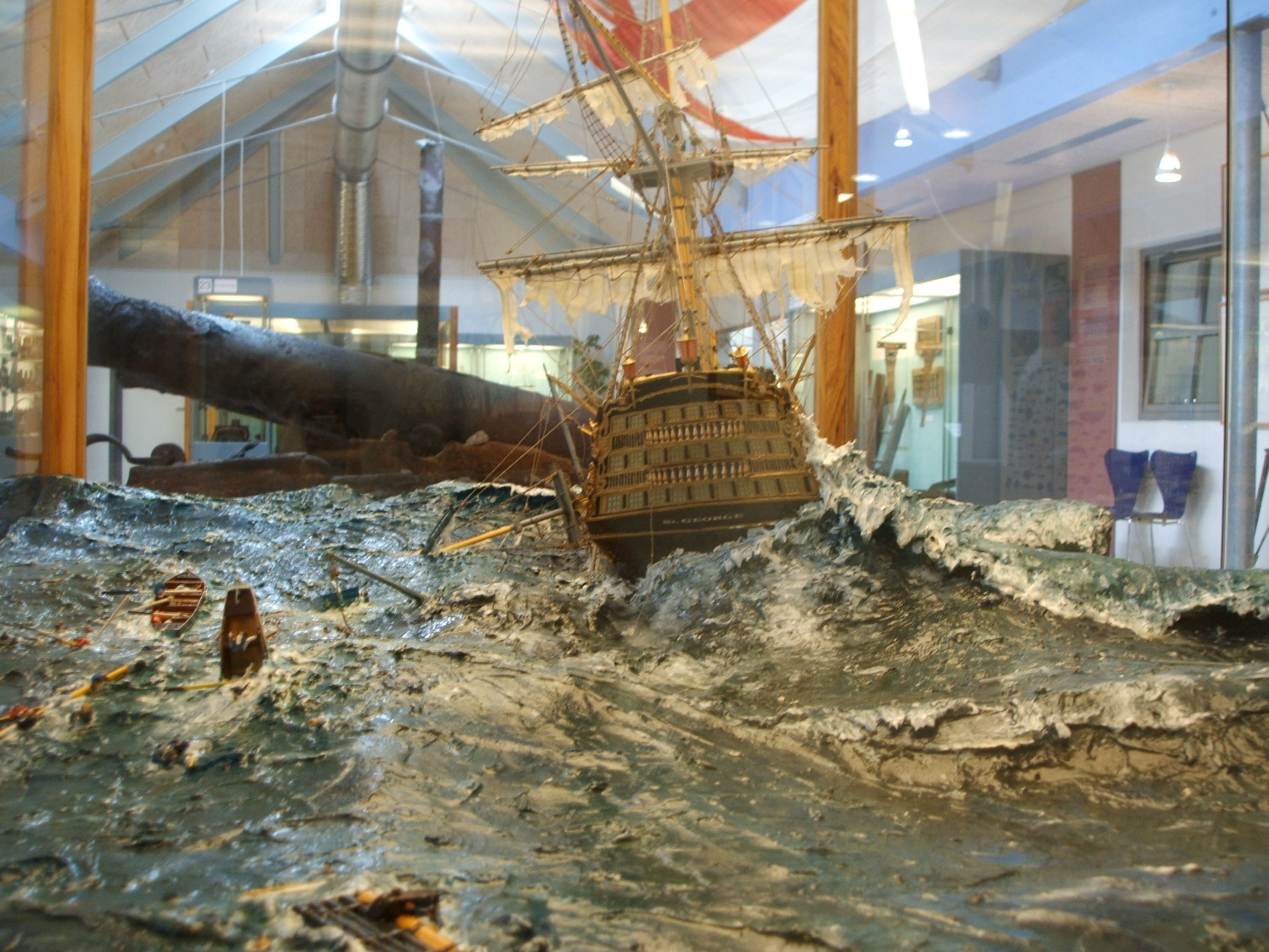 Diorama der Sturmfahrt der HMS St. George 1811